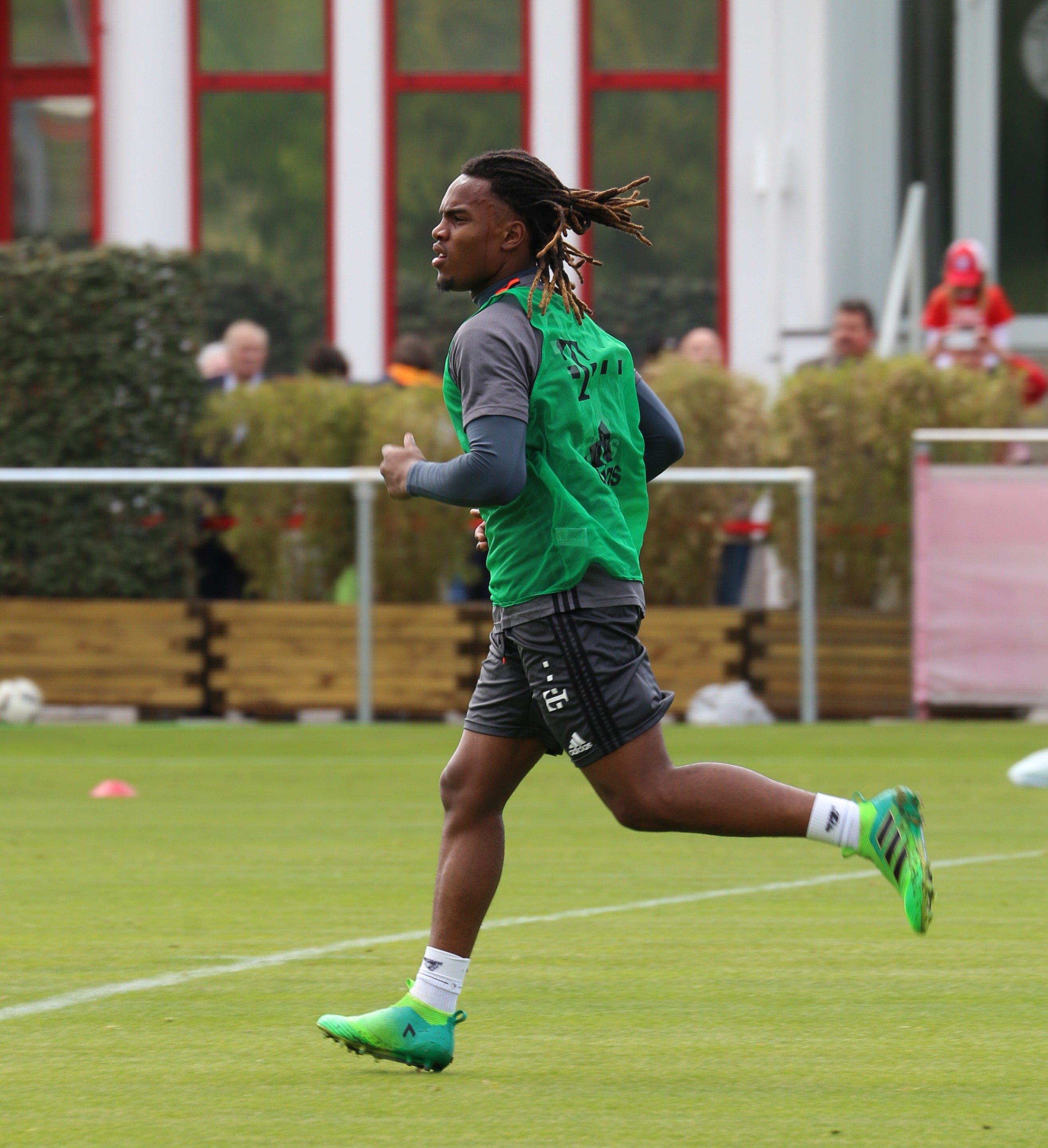 Renato Sanches, am 3. Mai 2017 beim Training auf dem Gelände des FC Bayern München